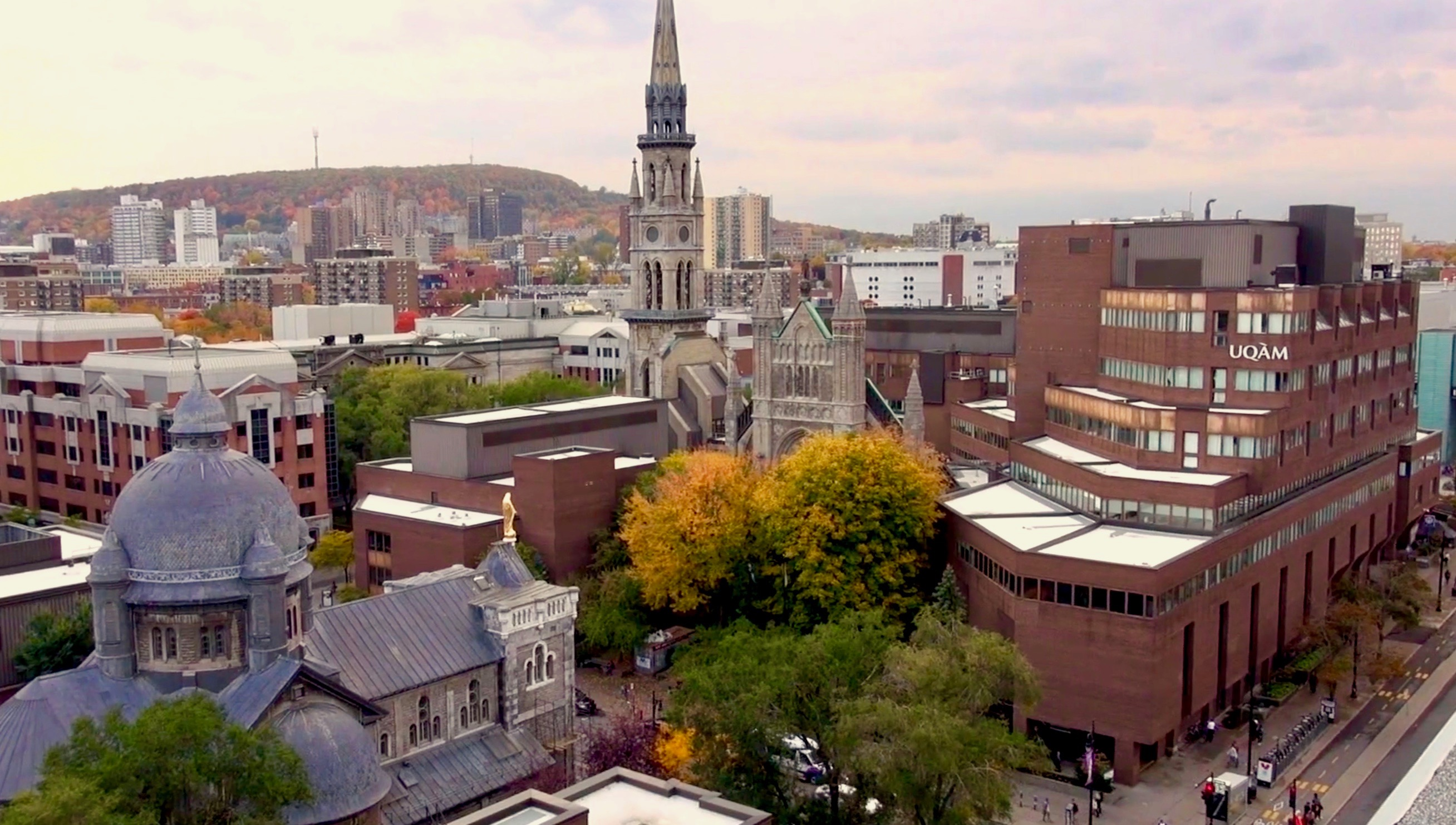 Vue du pavillon Judith-Jasmin de l'Université du Québec à Montréal (UQAM). Ce pavillon fait partie du campus central de l'institution, située au coeur du centre-ville de Montréal. À l'avant-plan, à gauche, se trouve la chapelle Notre-Dame-de-Lourdes, qui ne fait pas partie du campus. En revanche, le clocher, au centre, est celui de l'ancienne cathédrale Saint-Jacques, aujourd'hui intégrée au pavillon Judith-Jasmin. À l'arrière-plan, on aperçoit le mont Royal.